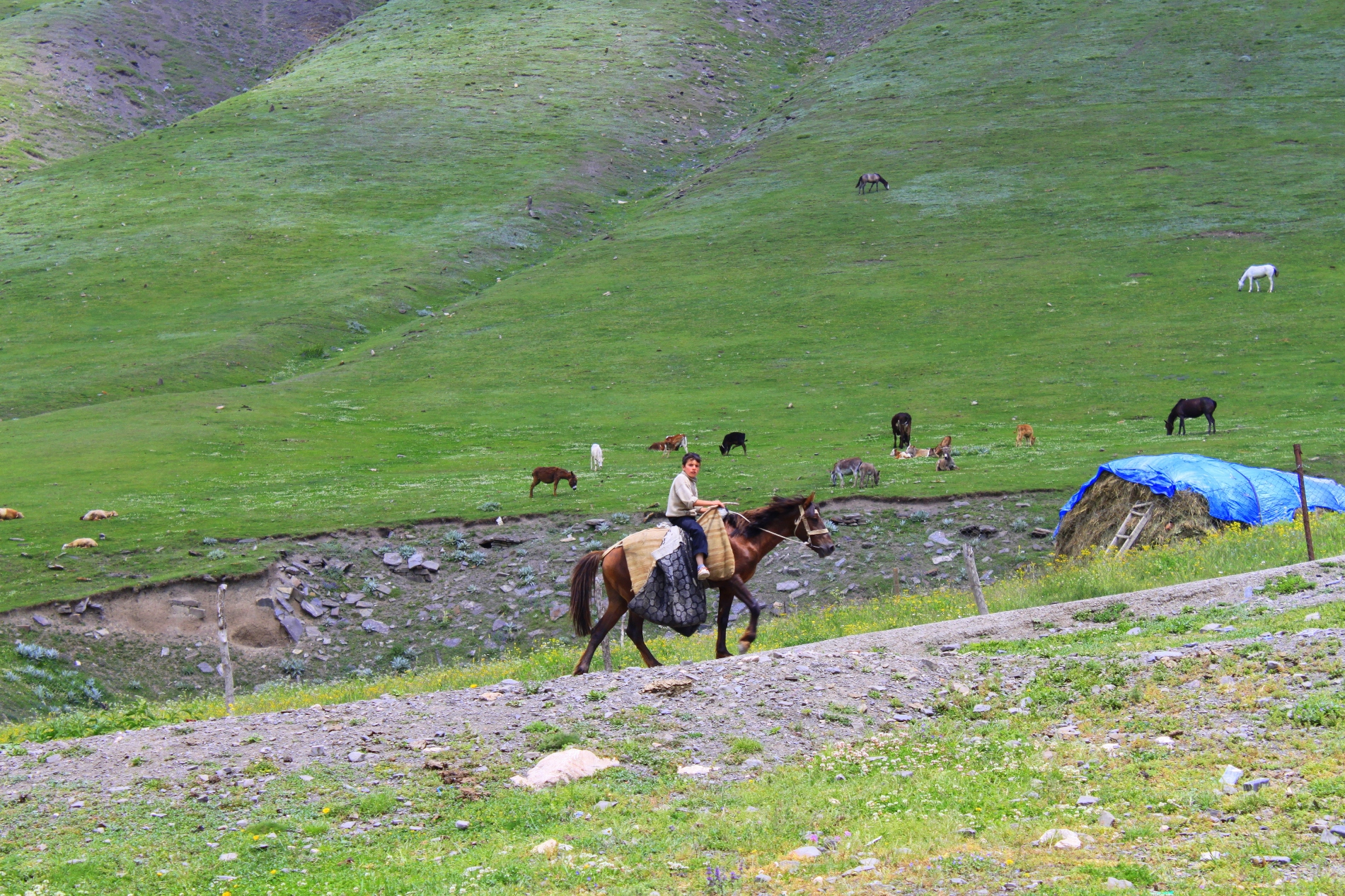 Житель села Хыналыг Губинского района Азербайджана